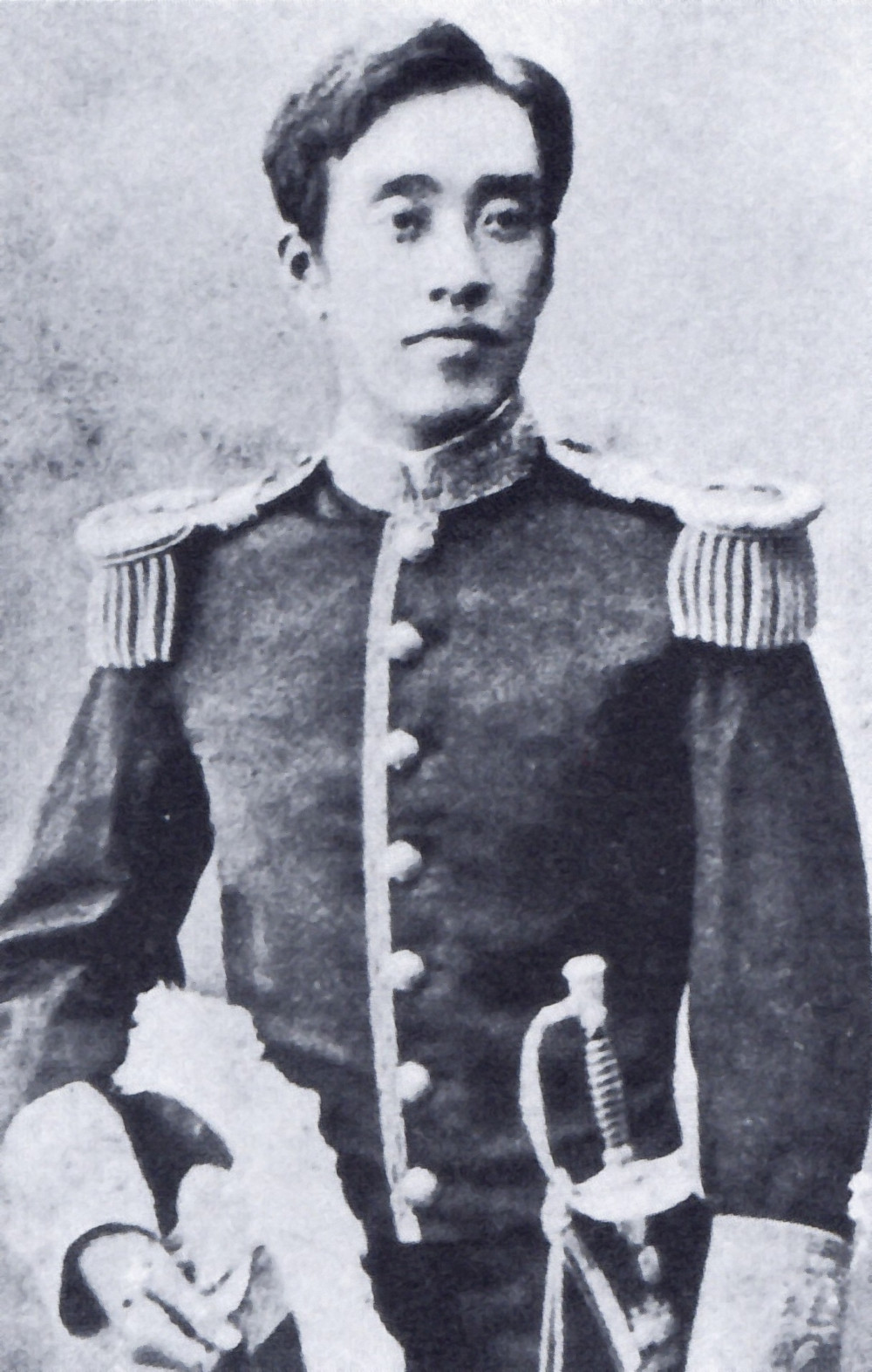 秋田映季の肖像写真。